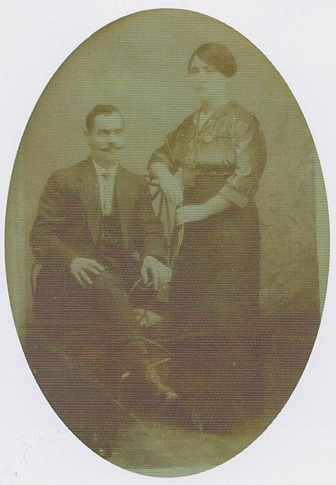 Ο Αθανάσιος Μανέτας με τη σύζυγό του Ανδρονίκη, το γένος Αλεξάνδρου.